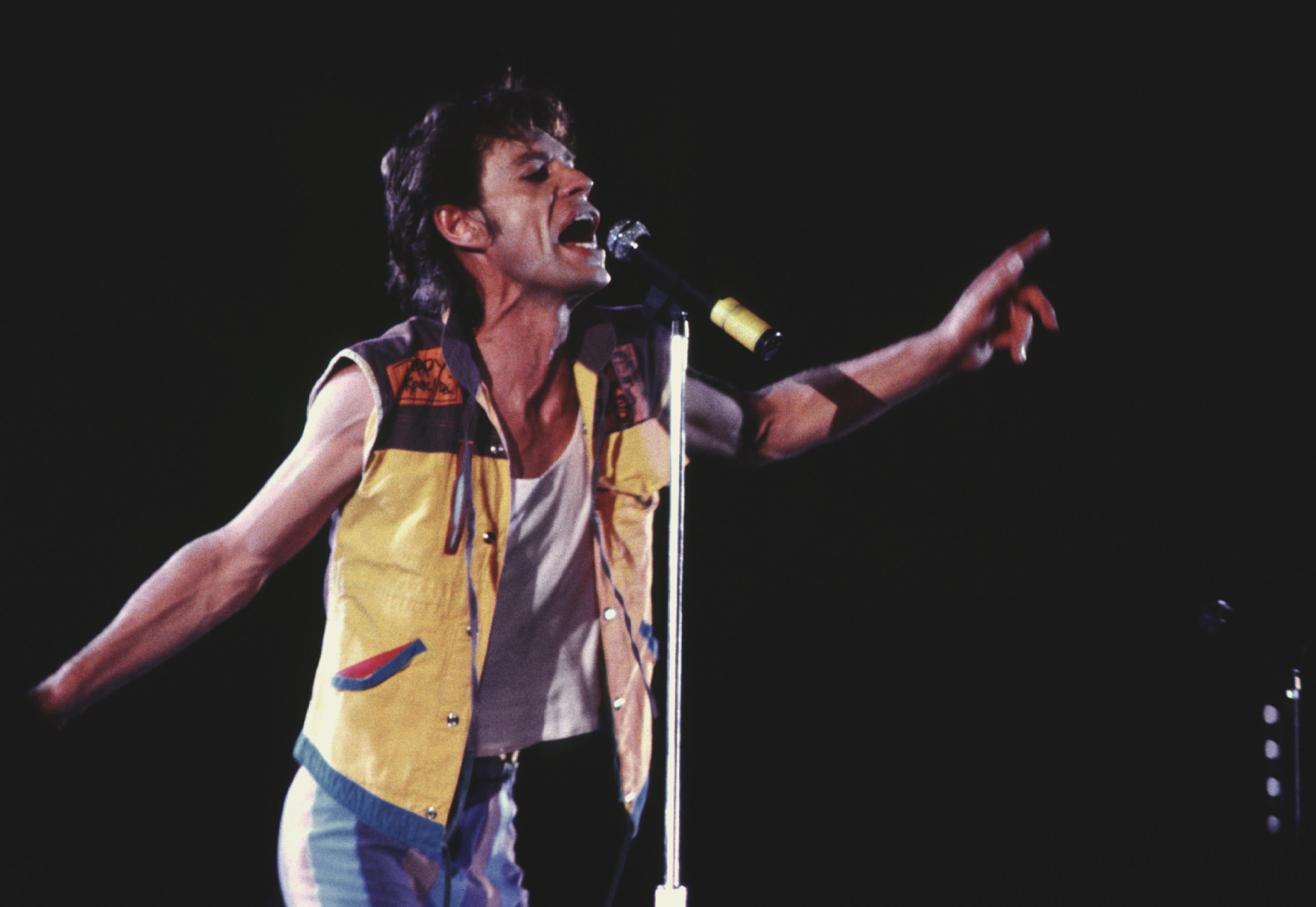 Concerto dei Rolling Stones a Torino, 1982, Mick Jagger